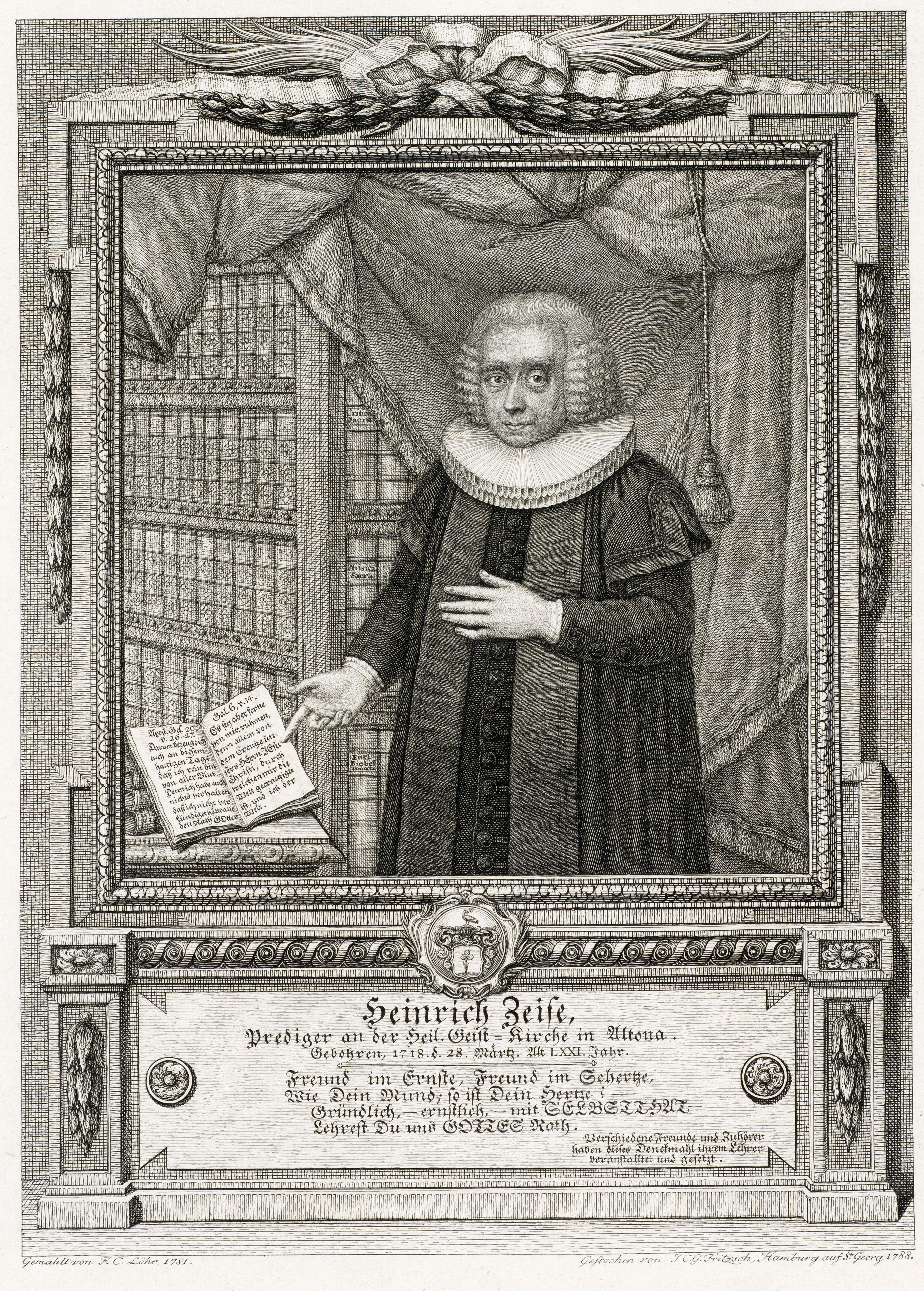 Heinrich Zeise, Prediger an der Heil. Geist=Kirche in Altona